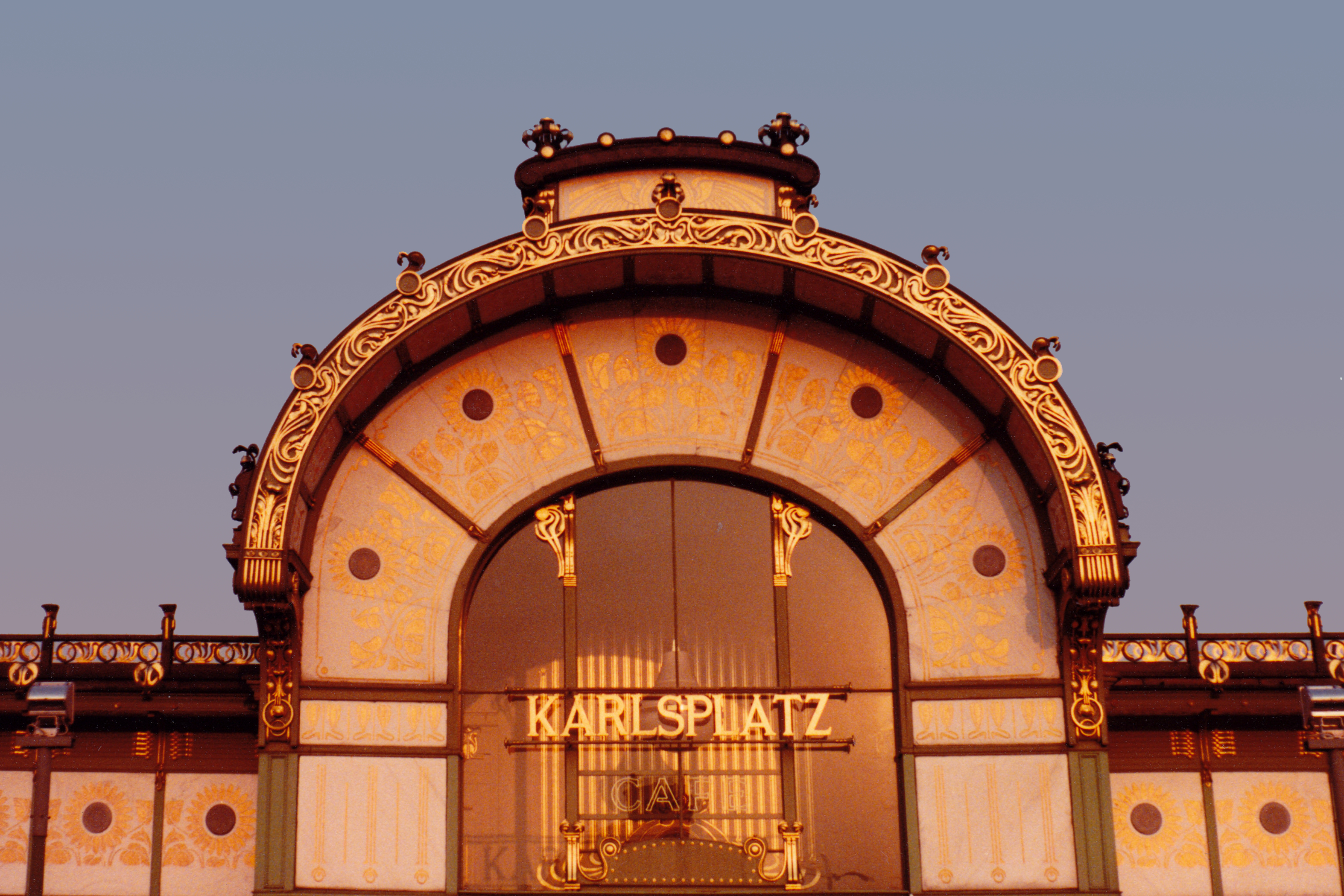 Autriche - Vienne - Station de métro Karlsplatz (architecte Otto Wagner)